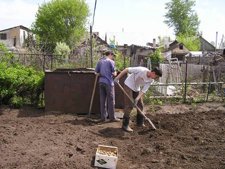 Ауыл шаруашылық туризм